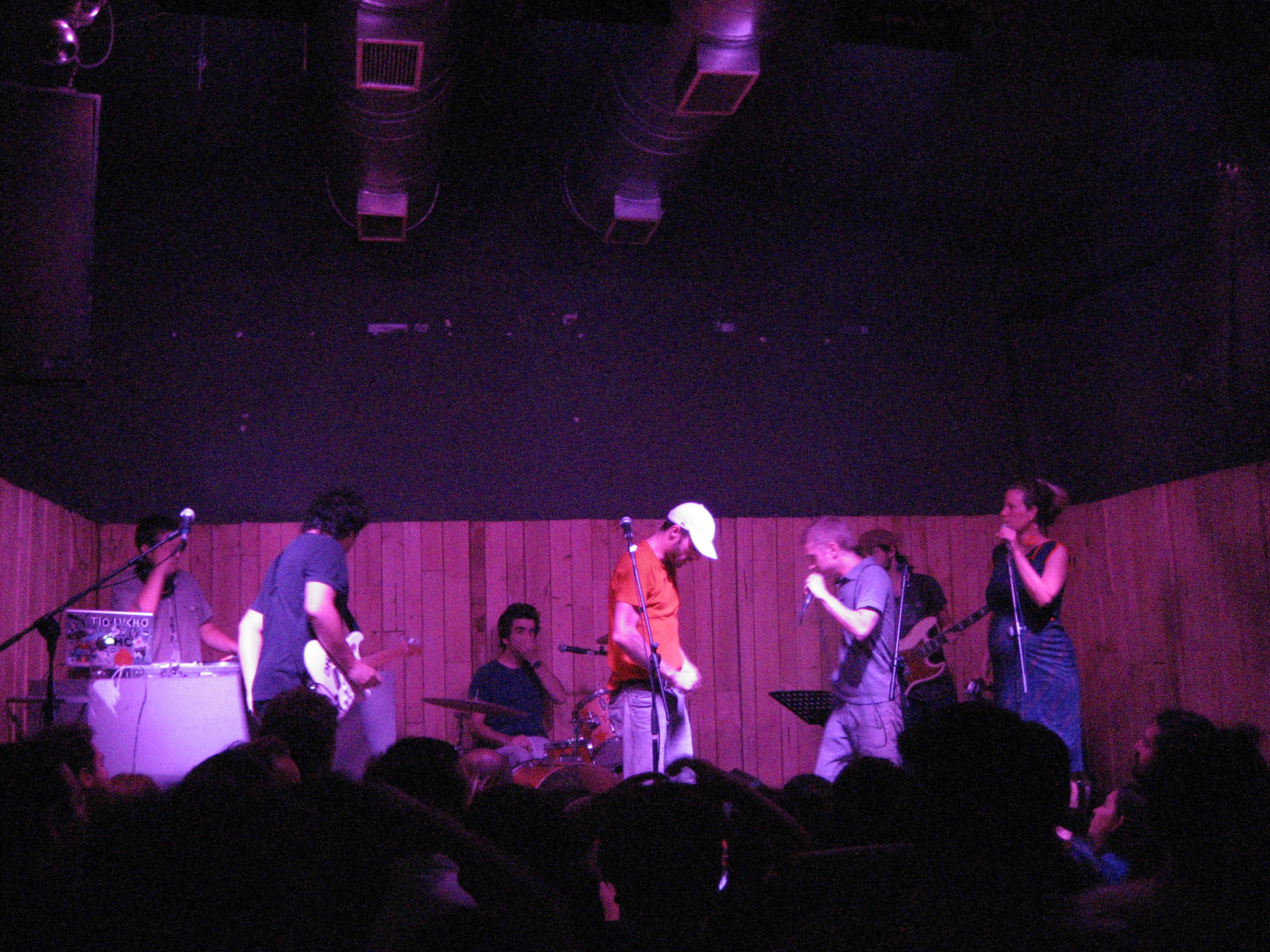 De izquiera a derecha: DJ Caso, Jorge del Campo, Pedro Subercaseaux, Sebastián Silva, Gabriel Díaz, Roberto Chicho Espinoza, y Andrea Ducci